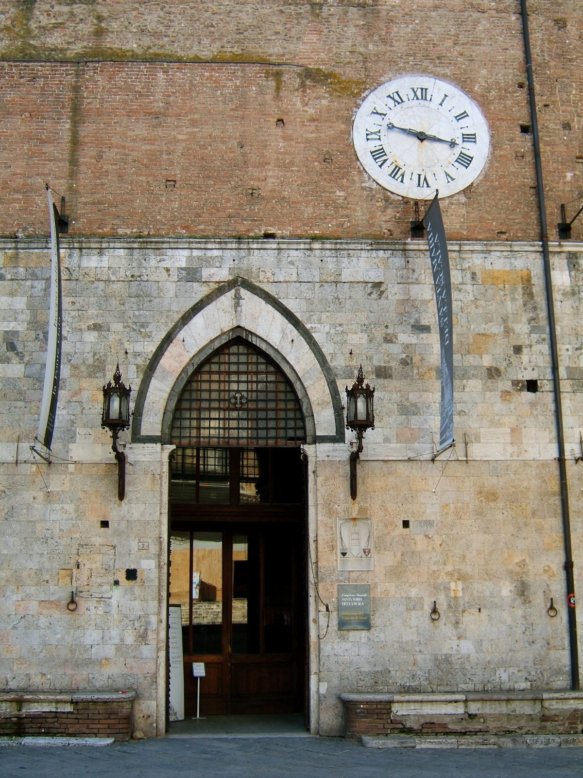 Ingresso del Complesso Museale Santa Maria della Scala, Siena